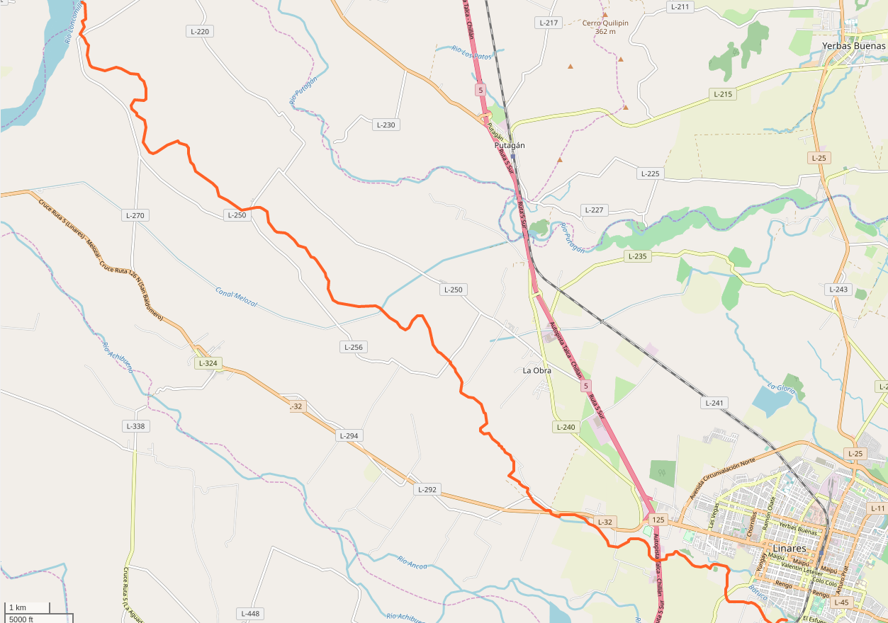 Estero Batuco (en rojo), río Putagán, canal Melozal, río Achibueno y río Ancoa al pasar por Linares, Región del Maule, Chile.